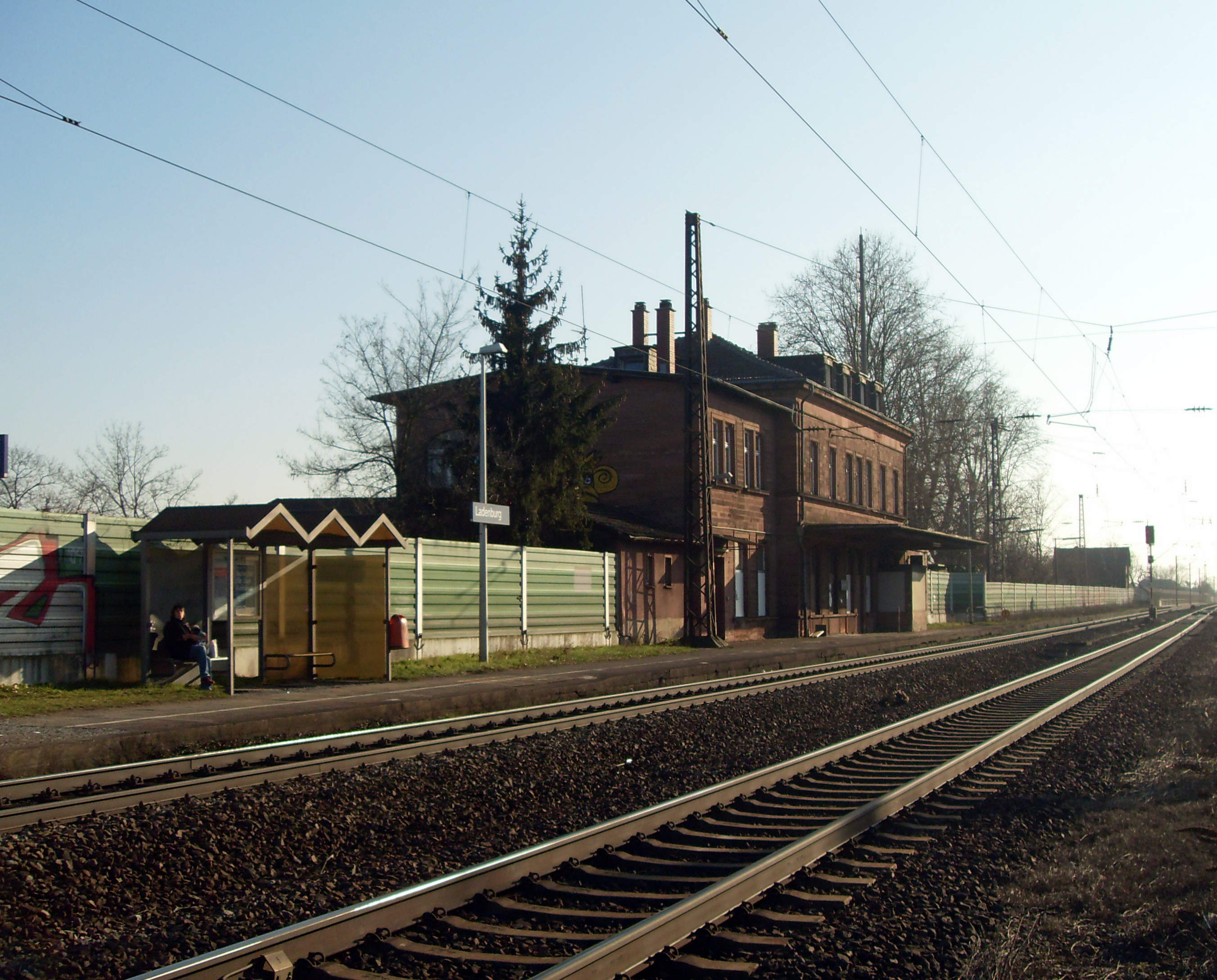 Ladenburg